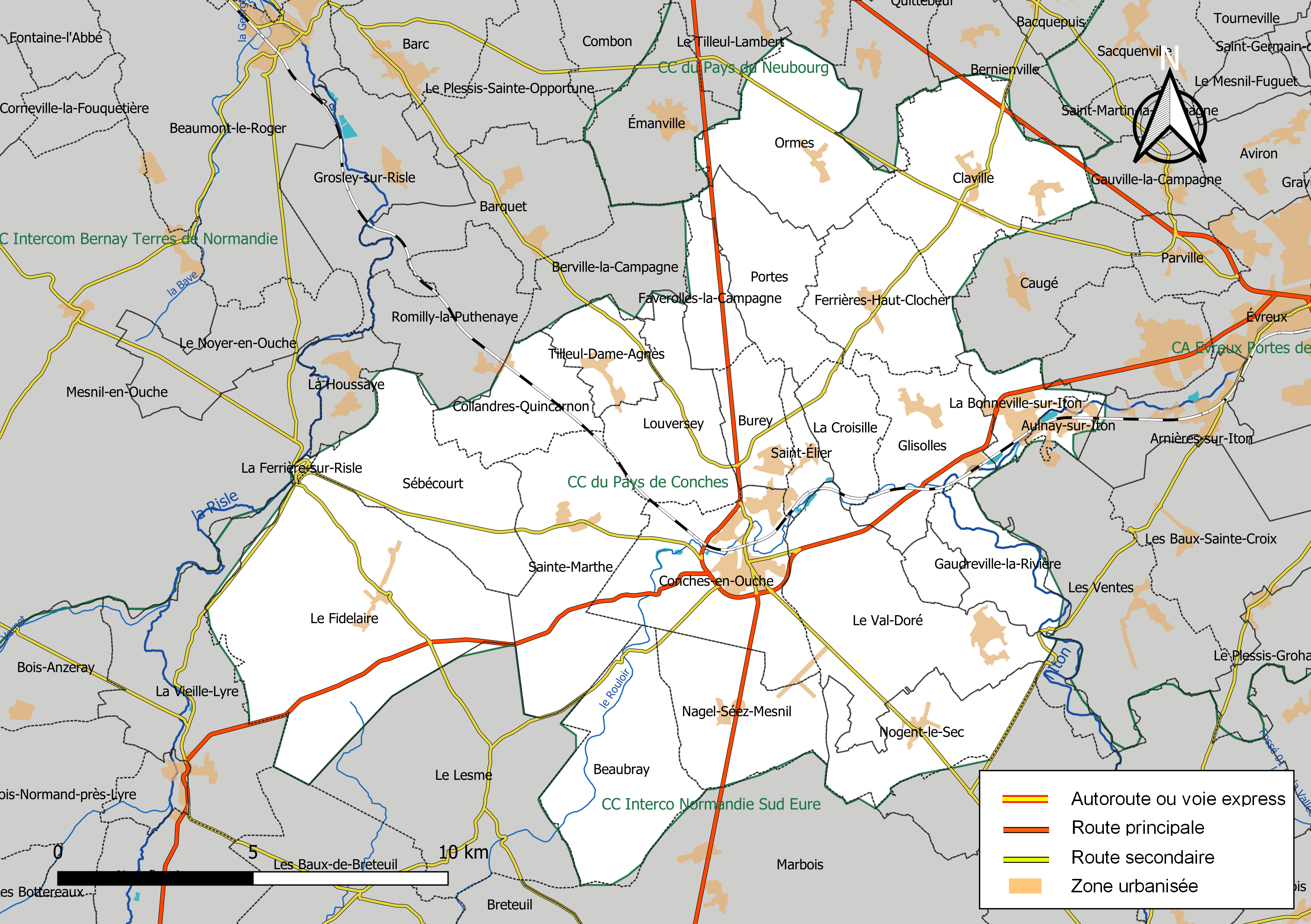 Carte géographique de la Communauté de communes du Pays de Conches, département de l'Eure, France. Composition au 1er janvier 2019.